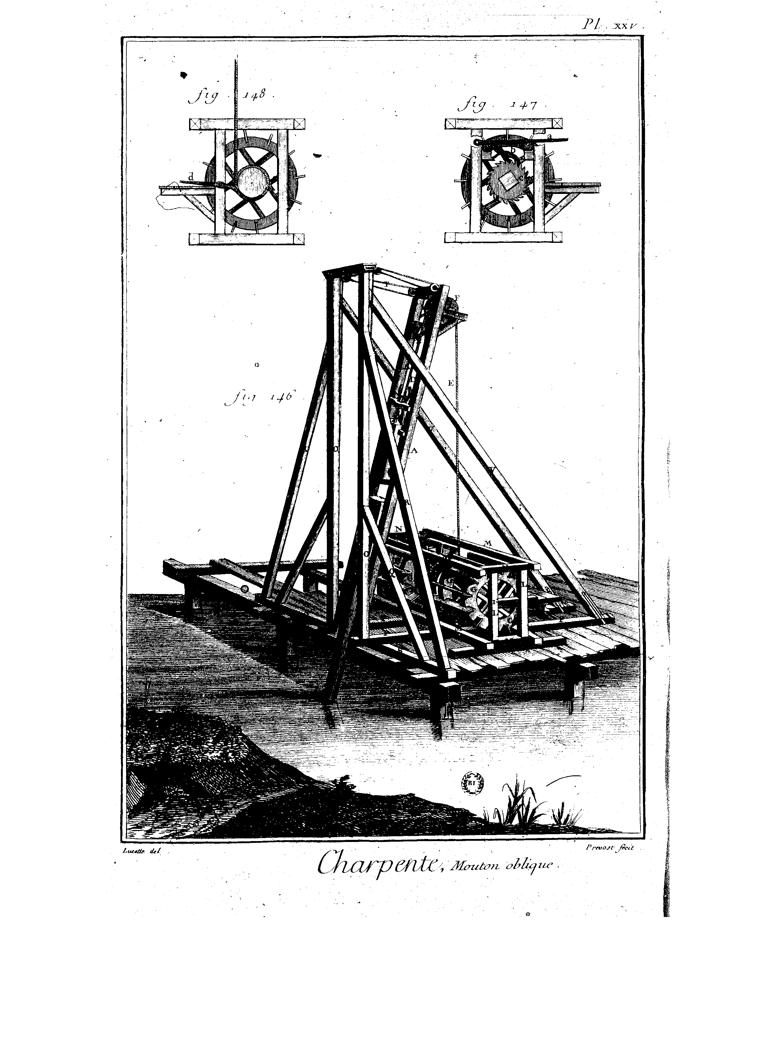 Planches de l'Encyclopédie de Diderot et d'Alembert, volume 2